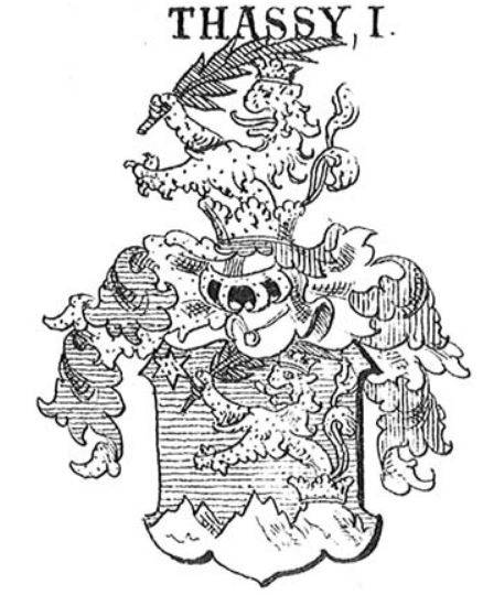 A miskei és monostori Thassy család cimere